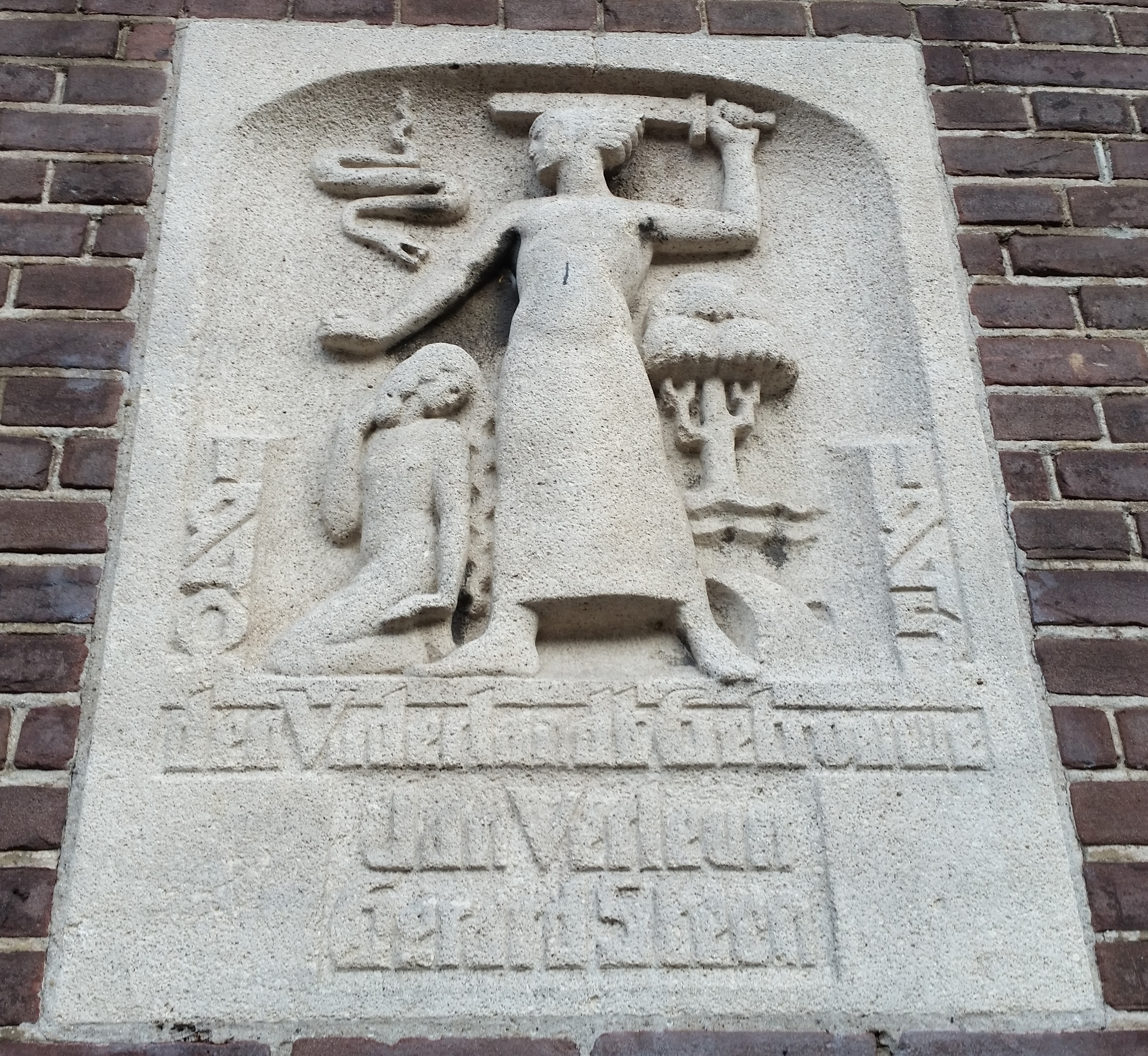 Gedenksteen Tweede Wereldoorlog aan Boomkerk